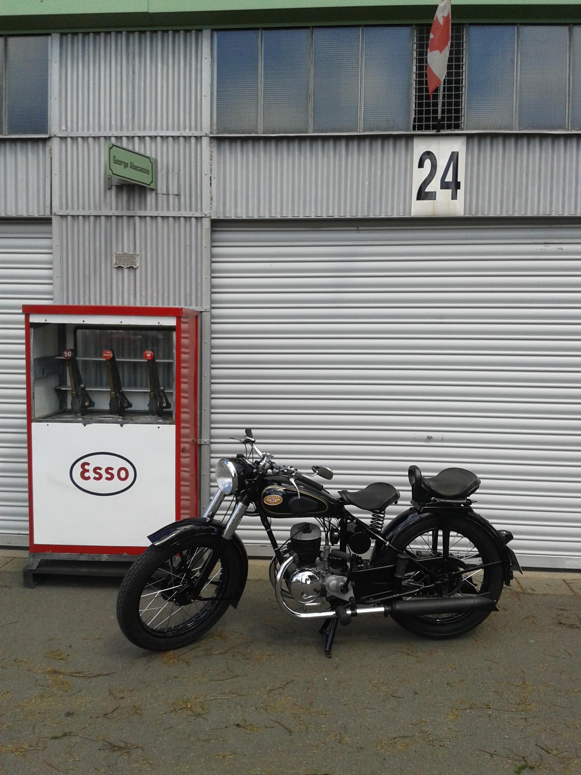 Zündapp DB 202 im Historischen Fahrerlager am Nürburgring